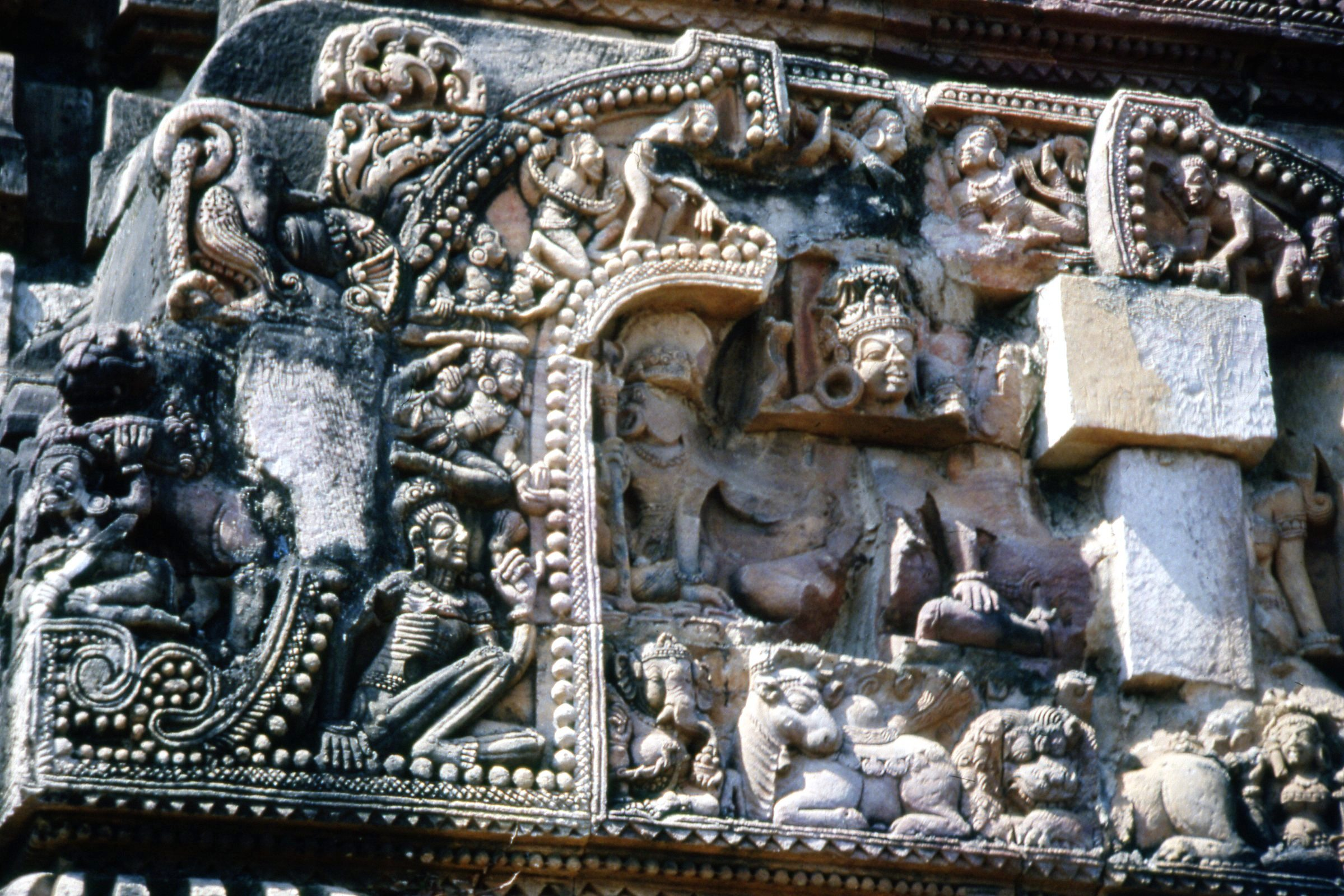 Siglo VII, Templo Parashuramesvara , Detalle de un pedimento en la parte exterior del templo, donde se observan entre otros grabados de vampiros y demonios (vetala) así como de animales, decorados y rodeados por guirnaldas. Bhuvanesvar, Orissa, India.